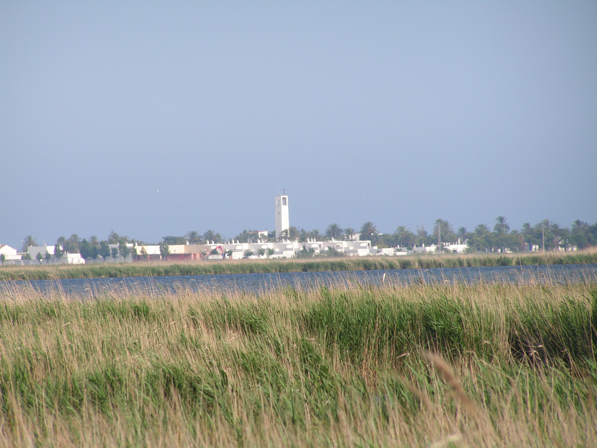 L'Encanyissada i, al fons, Poblenou del Delta